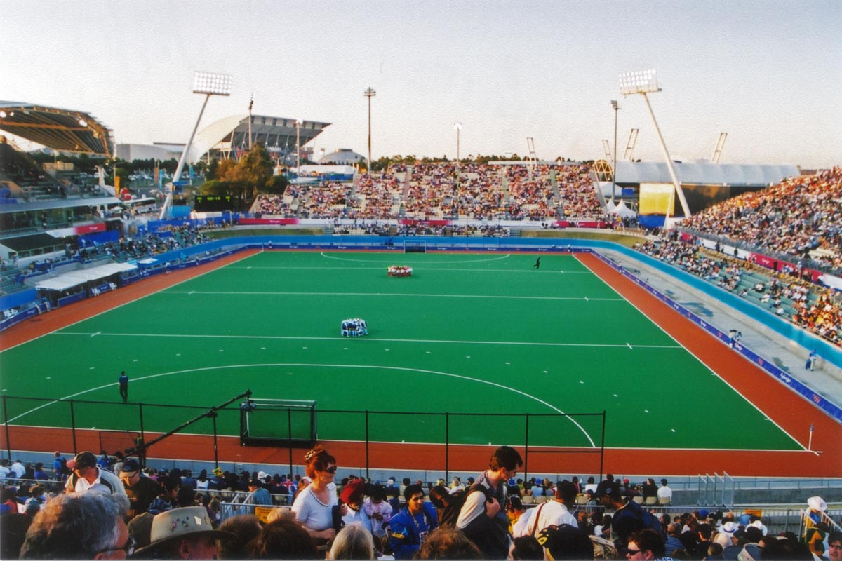 Hockey